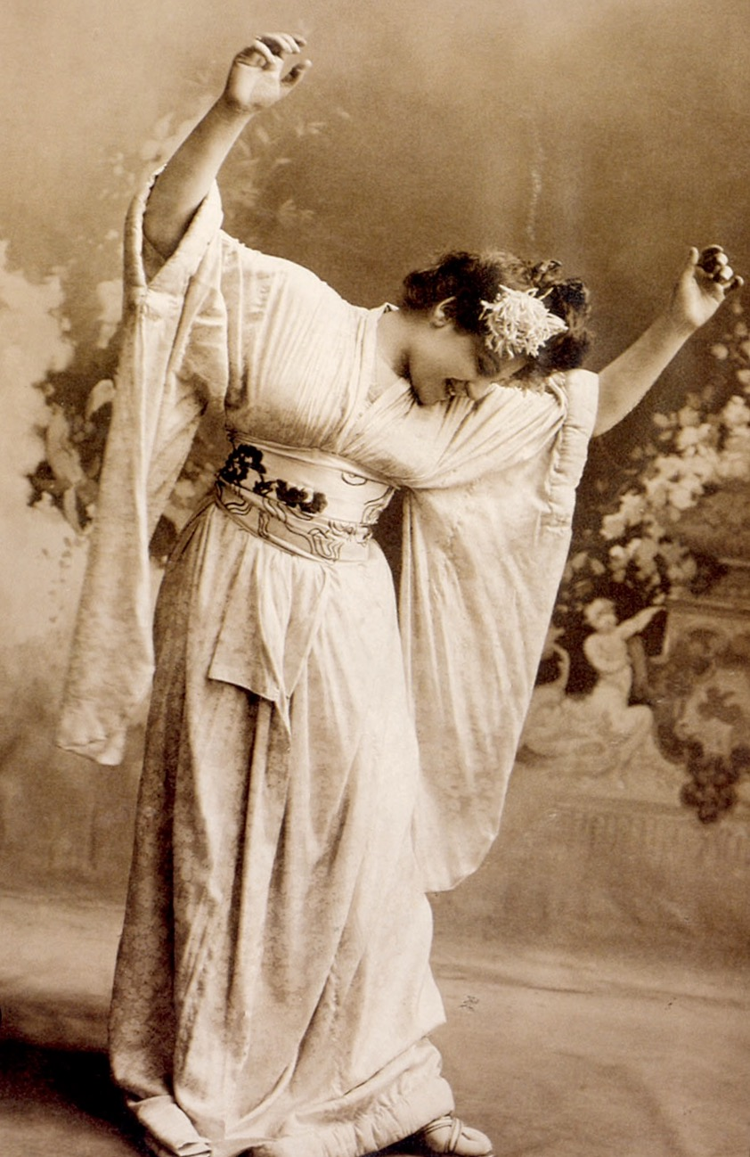 Il soprano italiano Maria Farneti nell'Iris di Pietro Mascagni